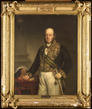 Gouverneur Generaal Ludolph Anne Jan Wilt Baron Sloet van de Beele